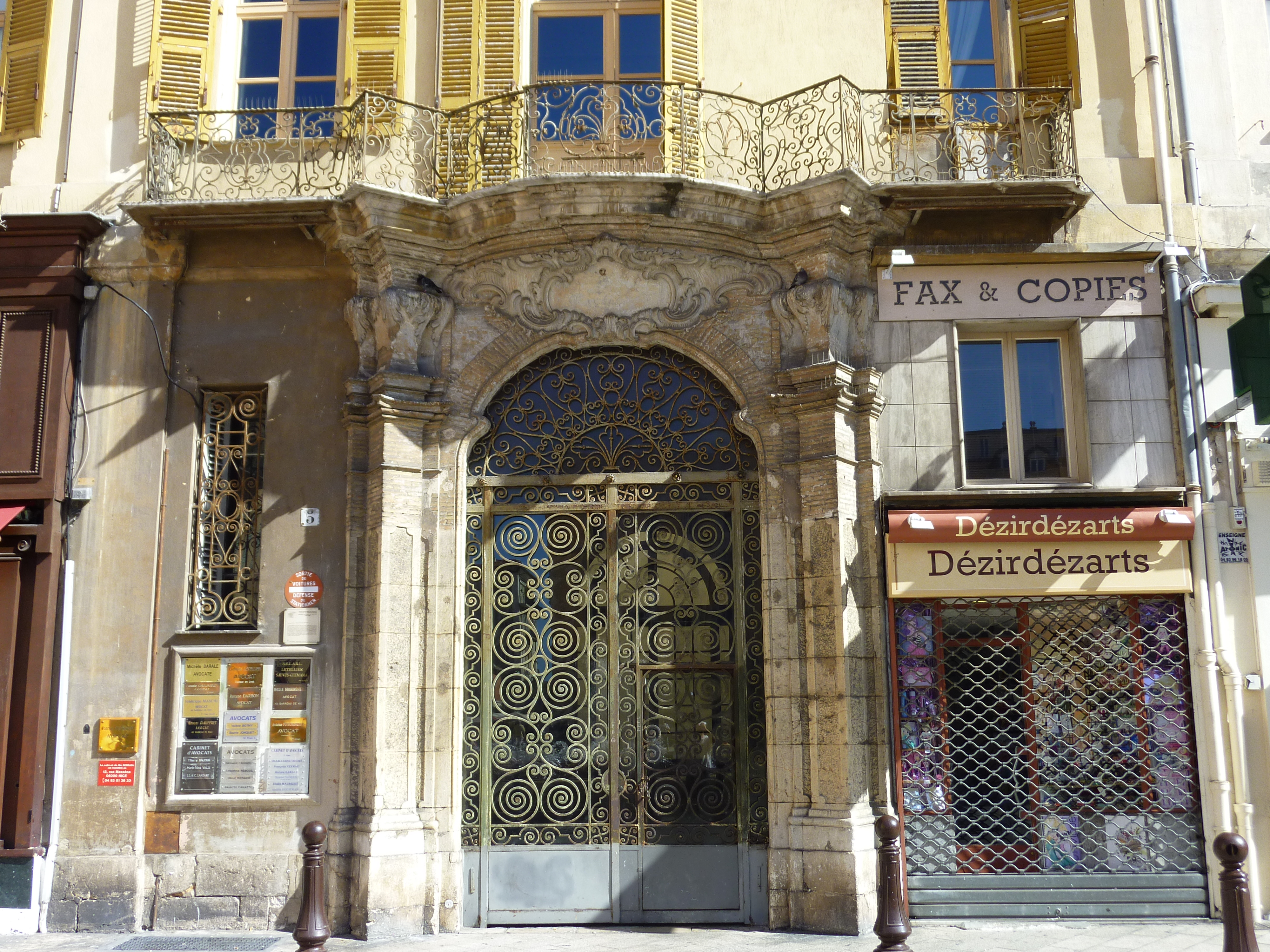 Façade du Palais d'York à Nice (Alpes-Maritimes, France) .